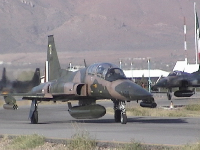 A Northrop F-5F Tiger II de la Fuerza Aérea Méxicana antes de despegar para maniobras de adiestramiento tactico en Sta. Gertrudis, Chihuahua, México.